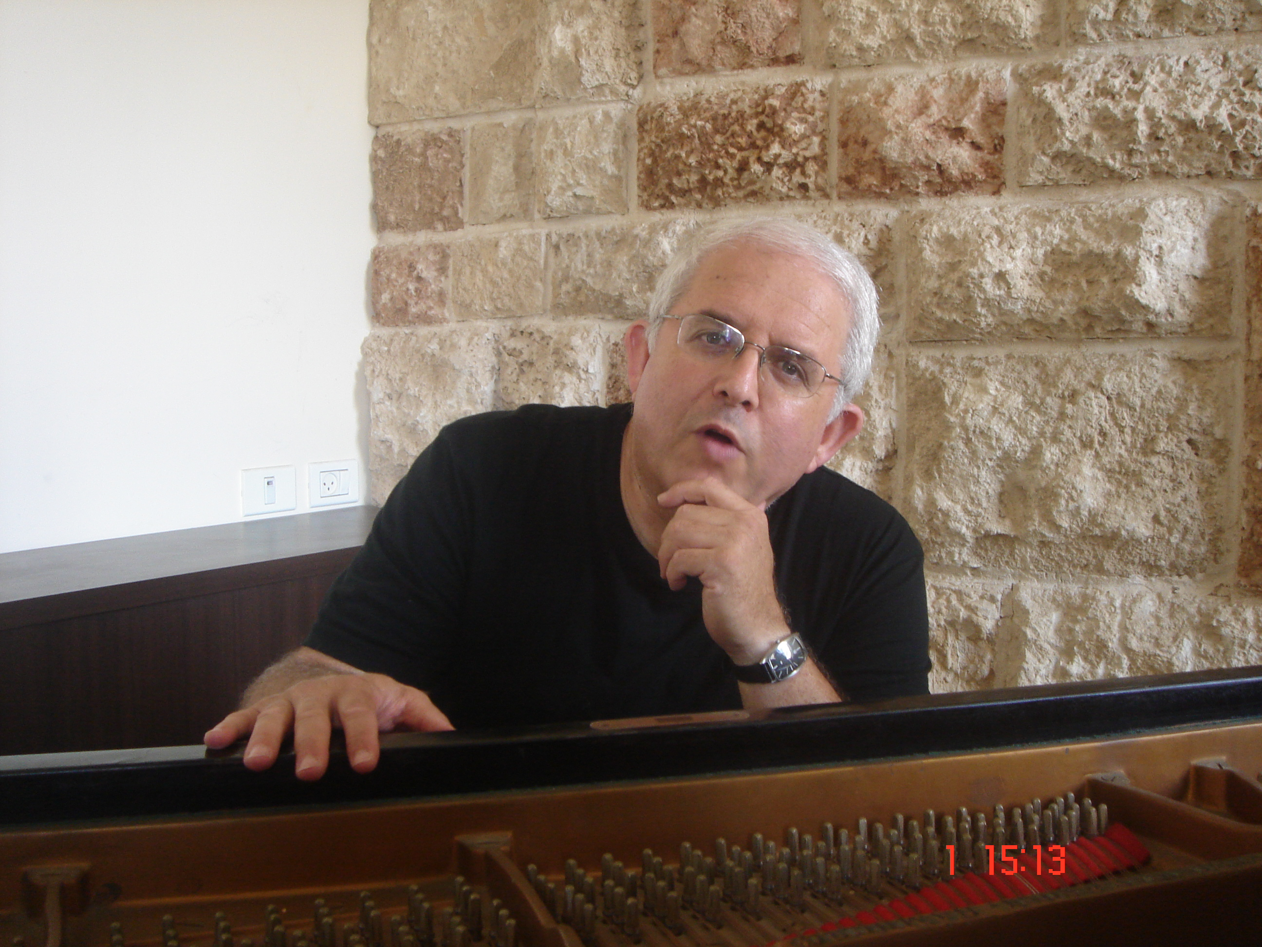 תמונה של משה זורמן